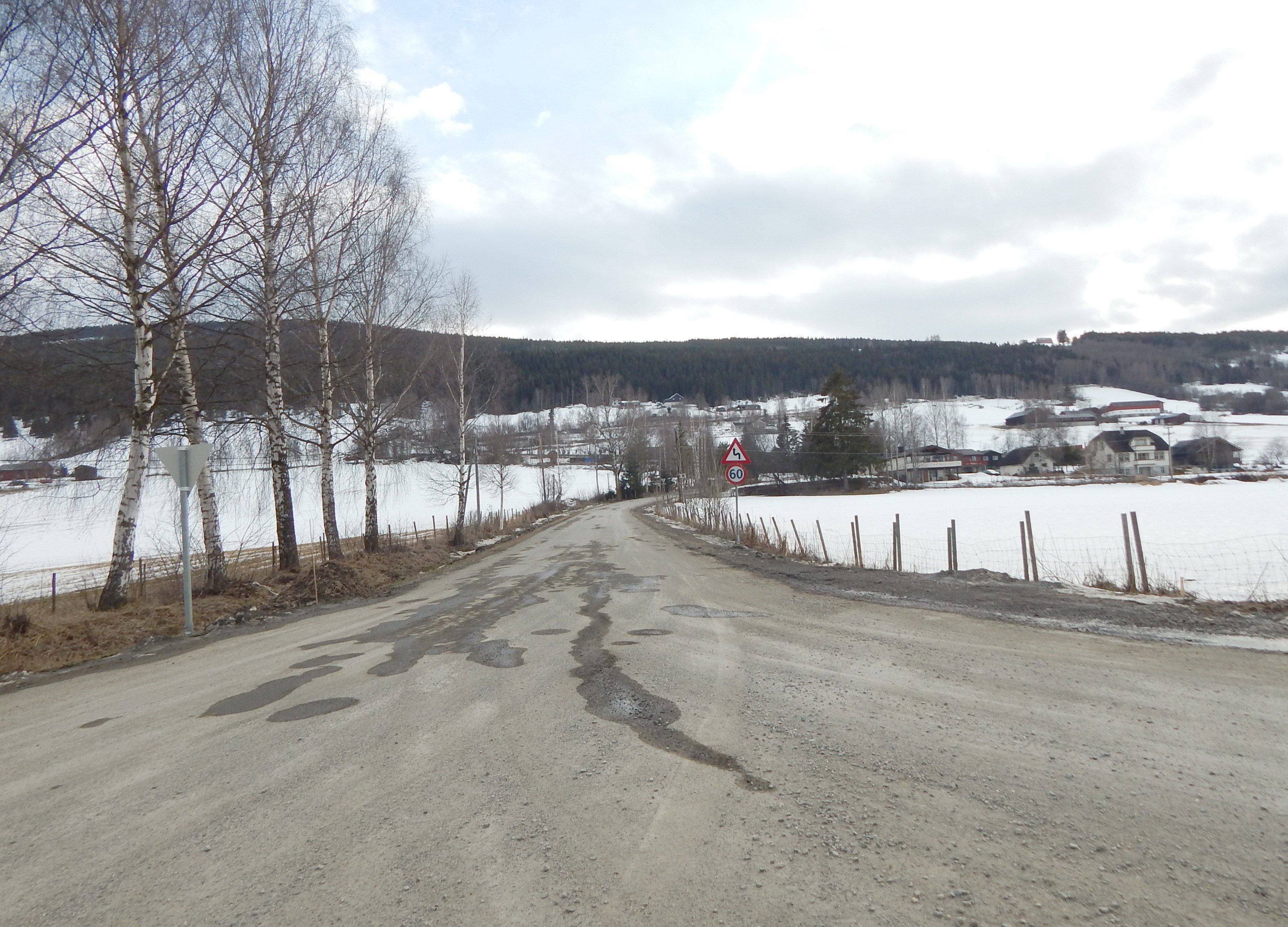 Søre Feforvegen (fylkesvei 423) sett fra Baksidevegen (primær fylkesvei 256)